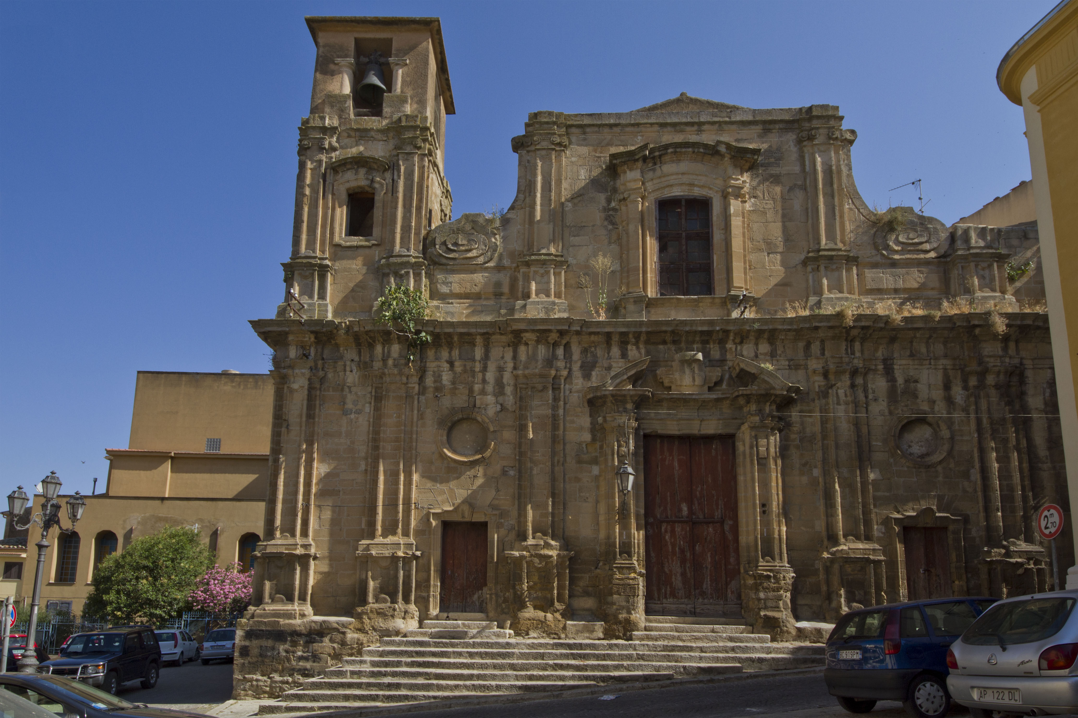 Parrocchia S. Rosalia, Corleone, Palermo, Sicily, Italy